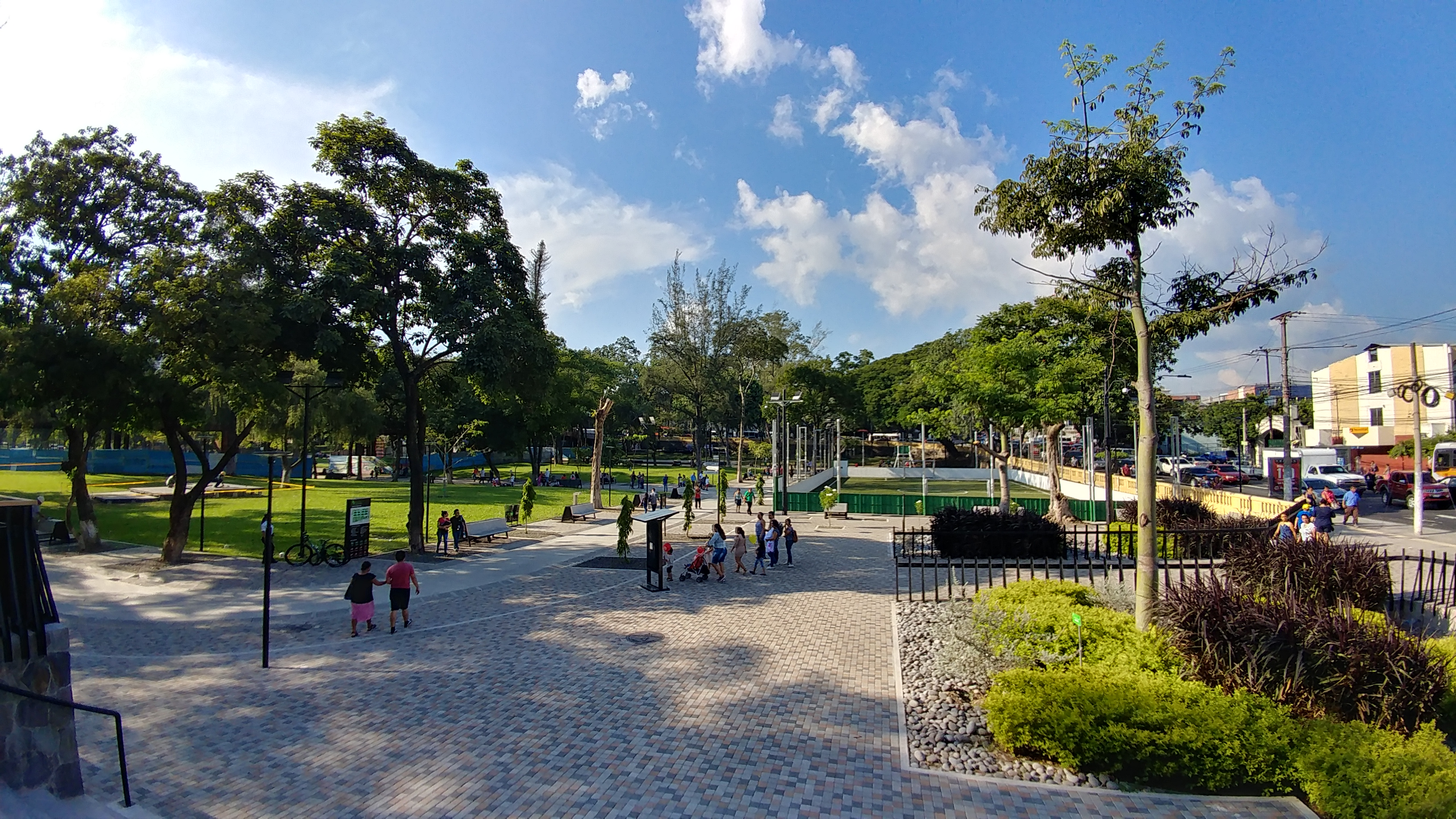 Moderno Parque Cuscatlán como los de primer mundo